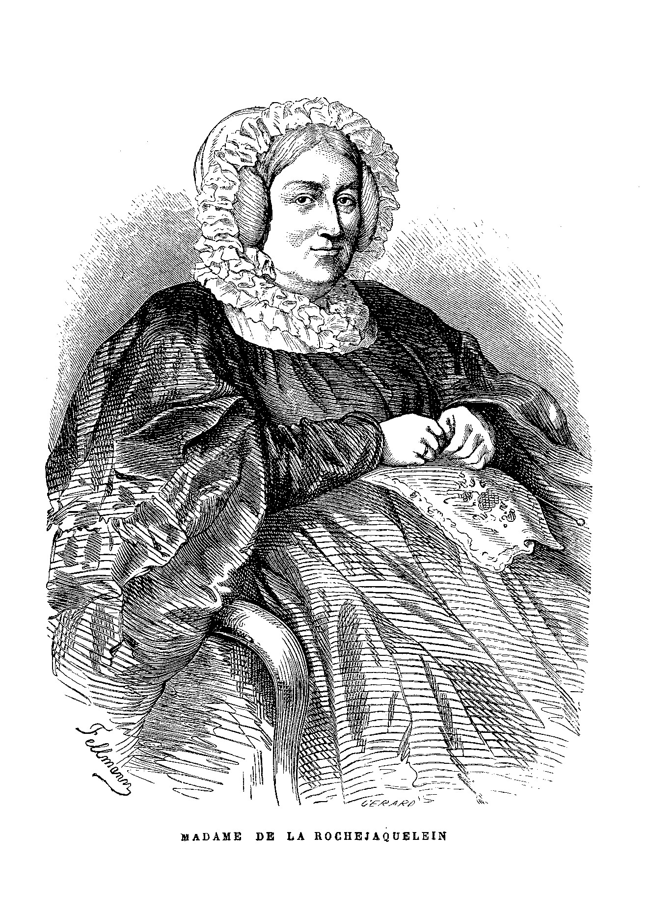 Victorine Donnissan, épouse La Rochejaquelein